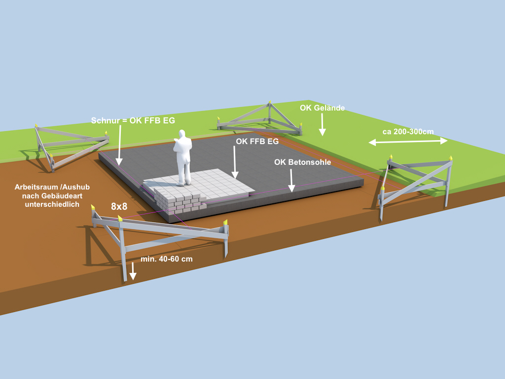 Schnurgerüst 3D Animation